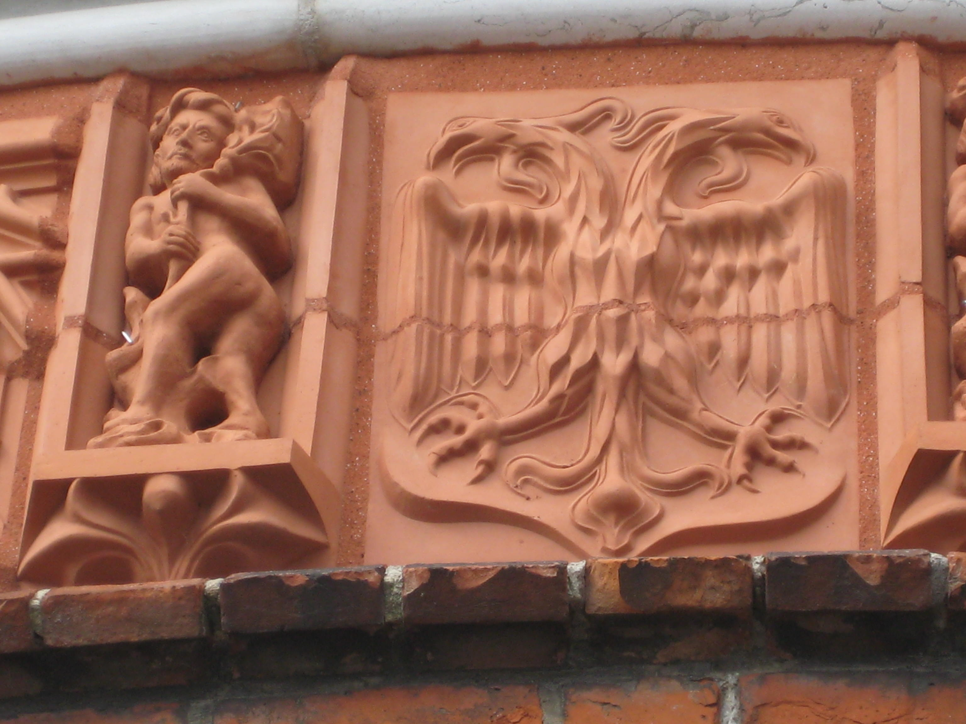 2005/2006 erneuerte Platte mit Doppeladler der Terrakottabänder am Holstentor in Lübeck